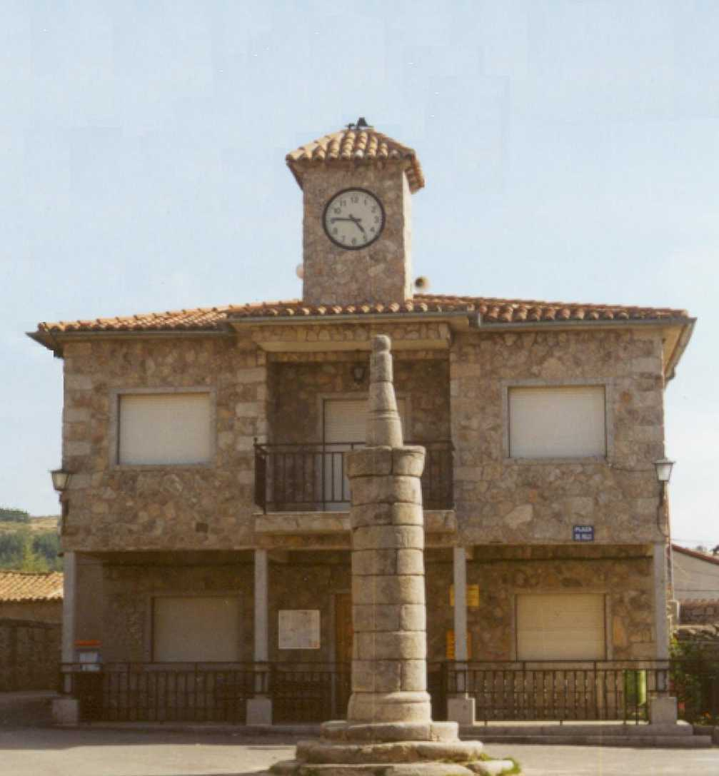 CEPEDA LA MORA (ÁVILA; ESPAÑA)